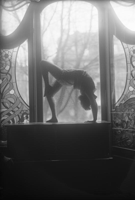 Aus dem Coreographischen Institut Laban in Berlin-Grunewald! Schönheit im Tanz.